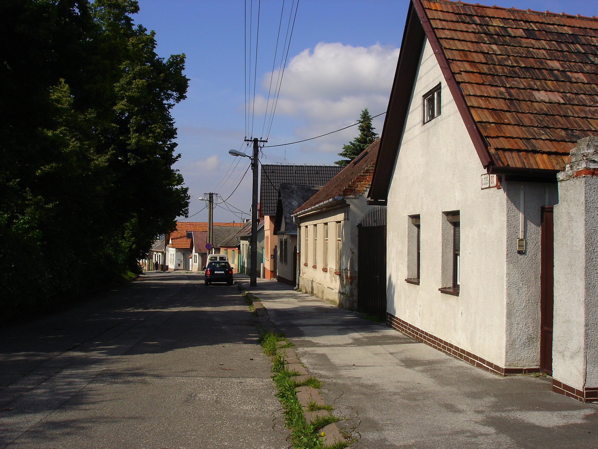 Stara Dubravka